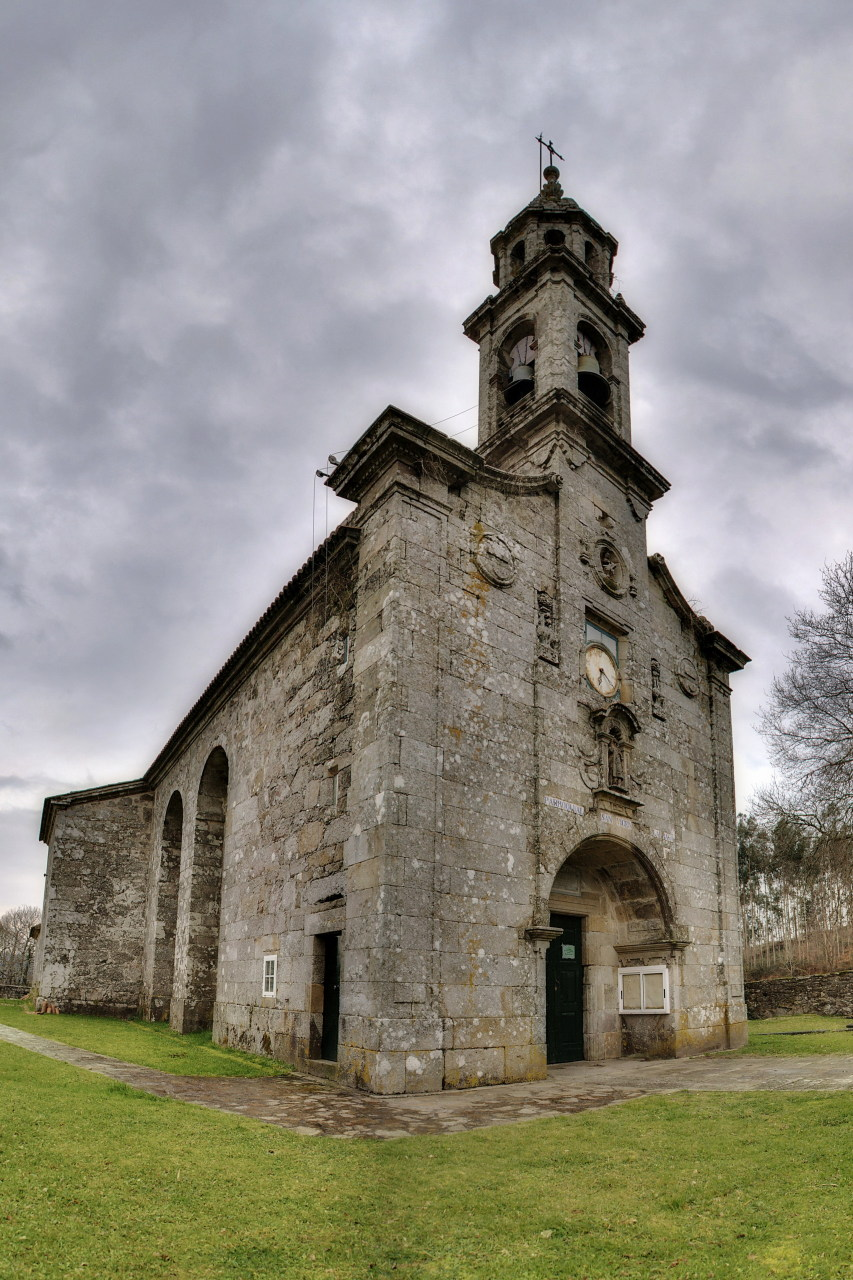 Construida en el S. XVIII, en varias etapas comprendidas entre 1732 y 1788. Tiene una nave de planta en cruz latina, con los muros de mampostería y sillería graníticas. Cubierta a dos y tres aguas con tejado de teja. La fachada, de cantería granítica, tiene un amplio pórtico en arco de medio punto con pilastras a los lados, una hornacina y un tondo con imágenes del Patrón y la Virgen. Está decorada con cuatro jarrones, medallones, volutas, a modo de aletones, y remata en cornisa alabeada con extremos en espiral. La sacristía ocupa el ángulo formado al norte de la Capilla Mayor y al este del crucero. La torre, de base cuadrangular, es la continuación del resalto central de la fachada. Tiene tres retablos con esculturas en el interior.